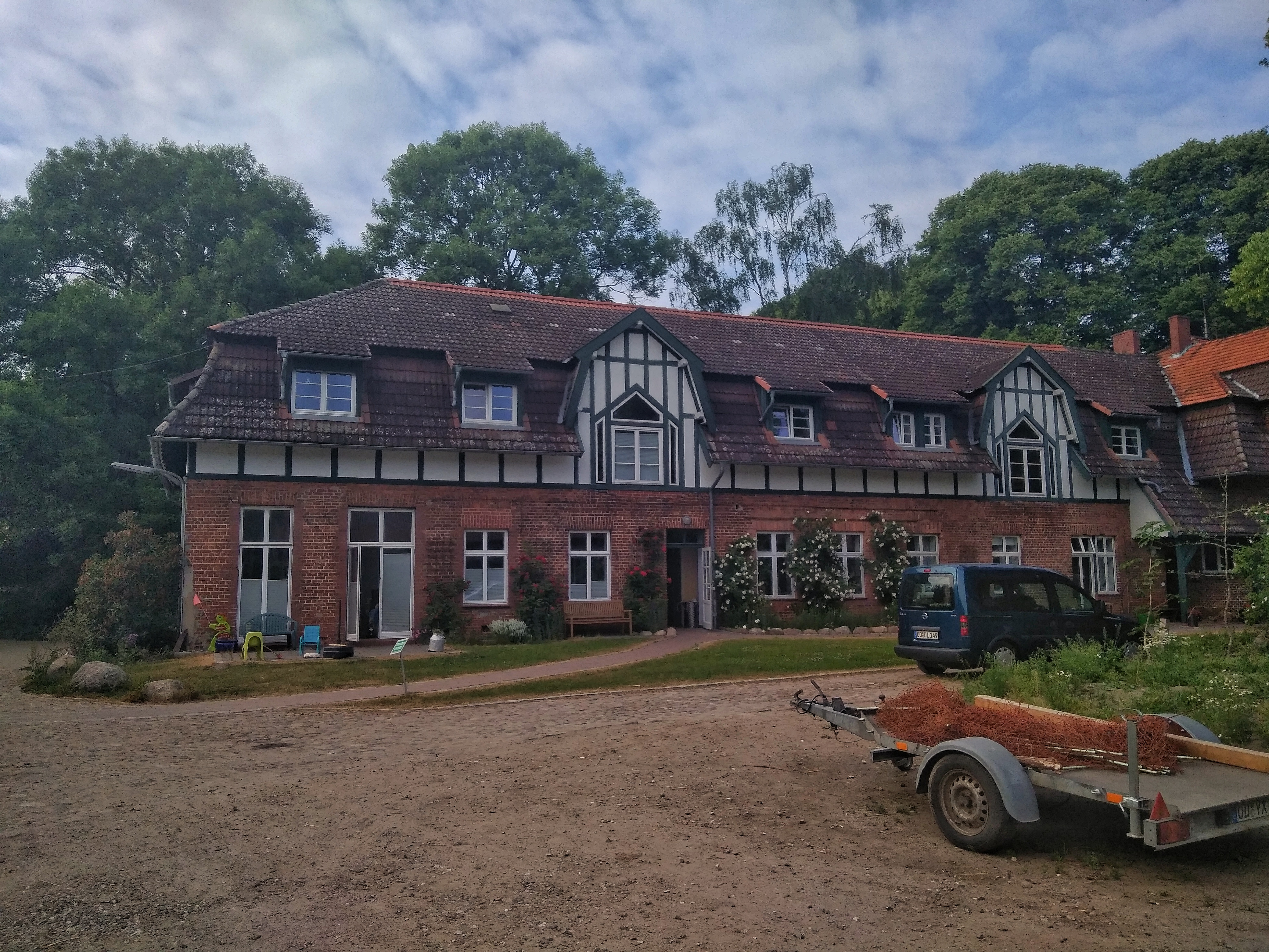 Gut Wulfsdorf